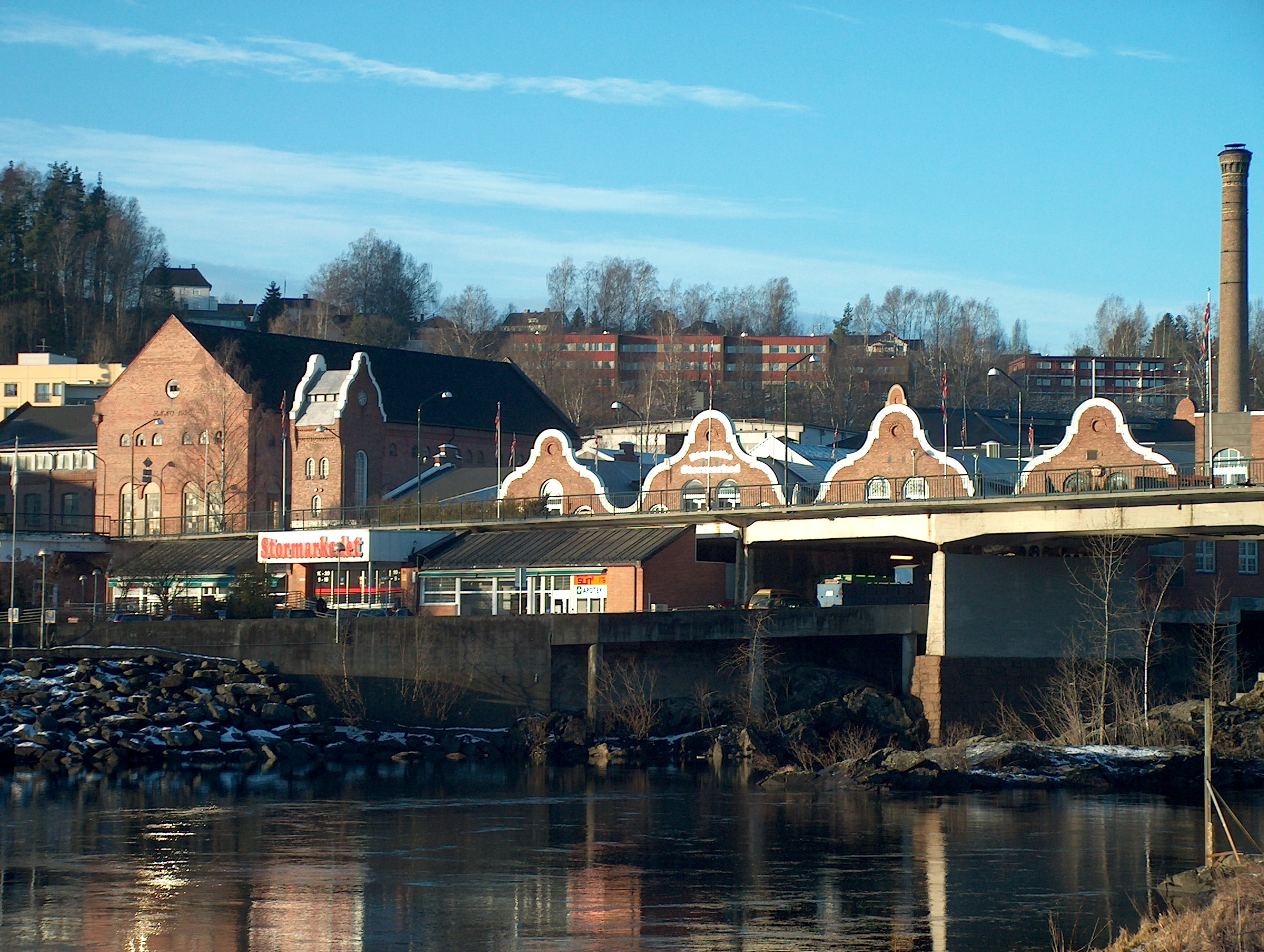 Ringerike Stormarked (Former Edw. Lloyd Limited)